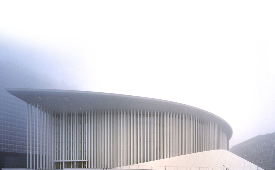 La Philharmonie en Luxembourg Atelier Christian de Portzamparc